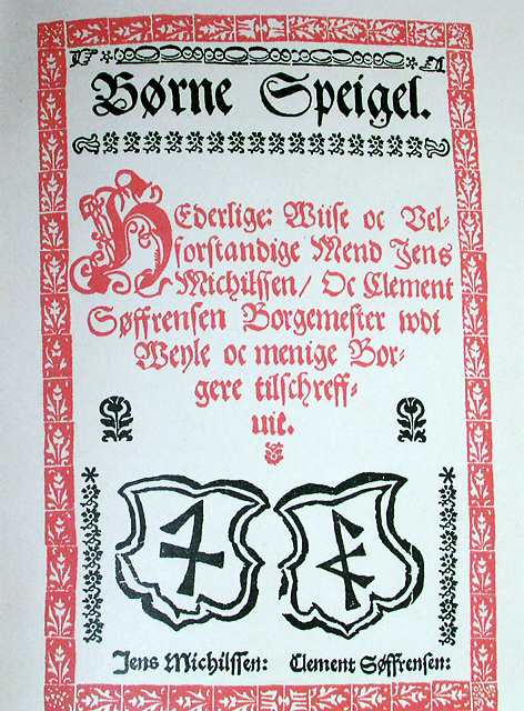 Forsiden av første utgave av Børnespejl av Nils Bredal